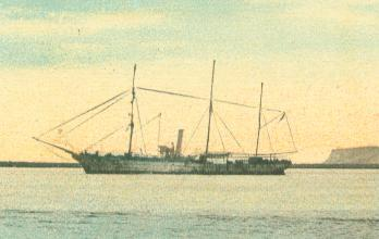 Fotografia del barco USRC Bear, que realizó la expedición al ártico Bahía de Lady Franklin en 1881, capitaneado por Adolphus Greely.